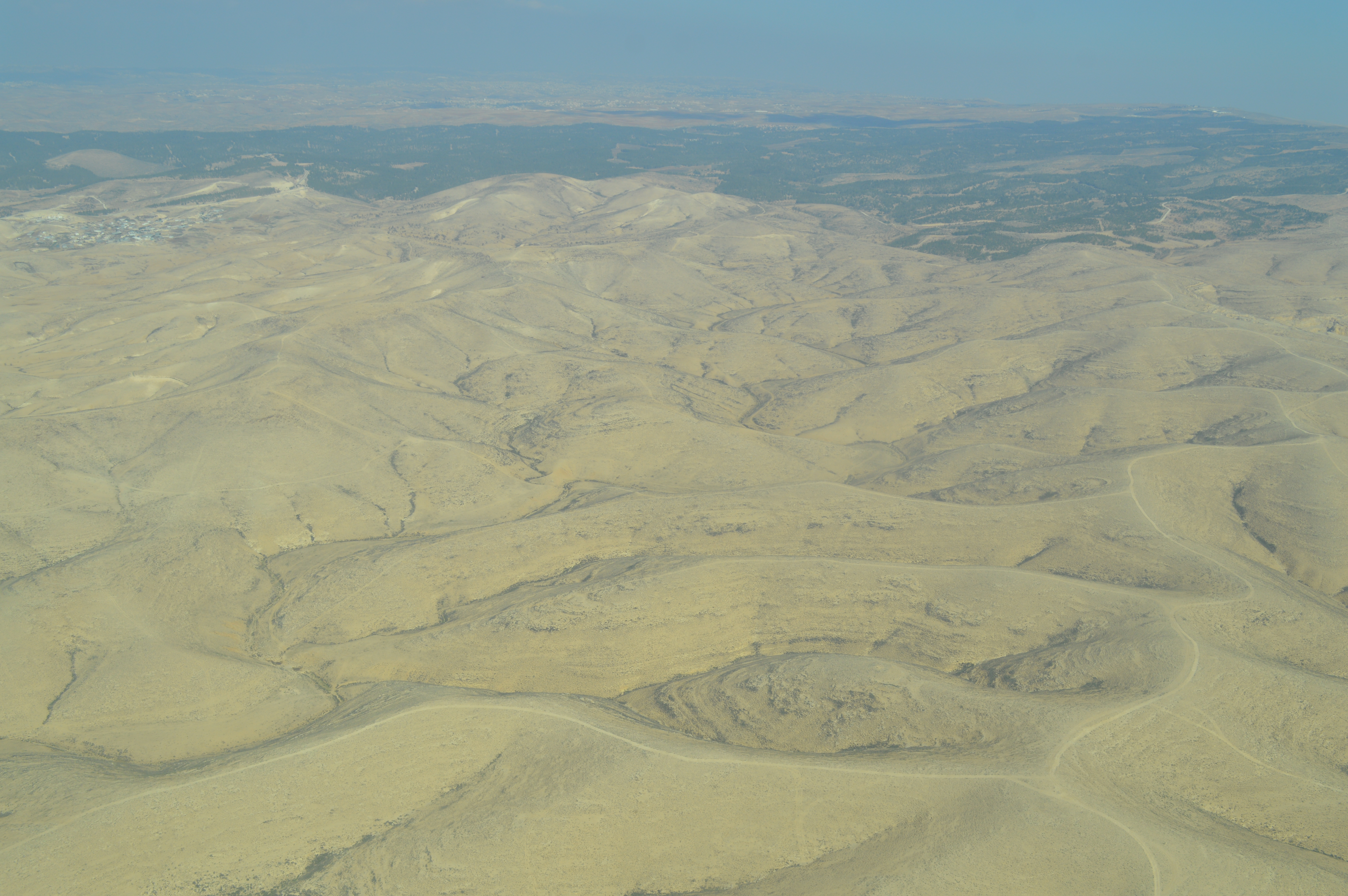 צילום אוויר - אזור יתיר